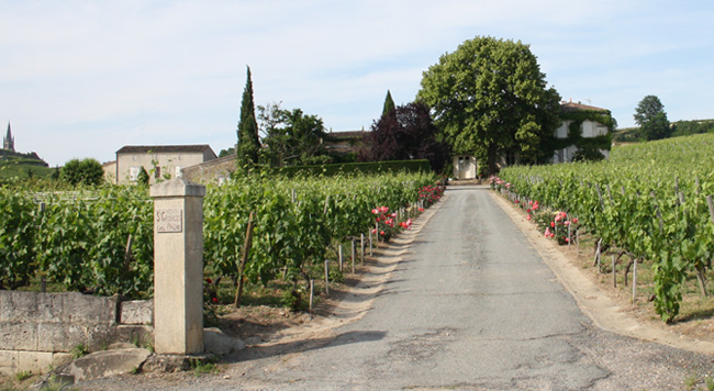 Chateau Saint Georges cote Pavie - Saint émilion